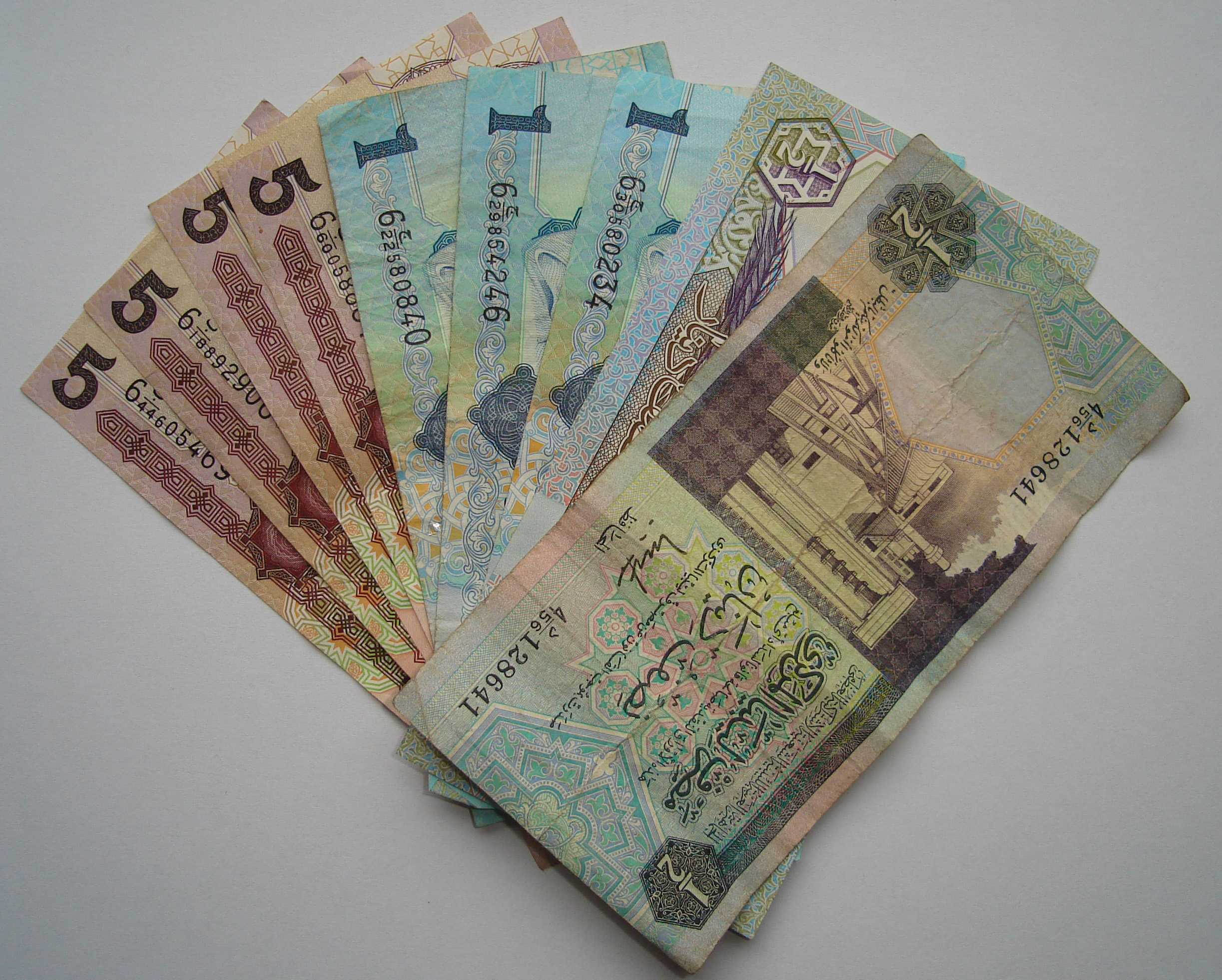 Libyan bills